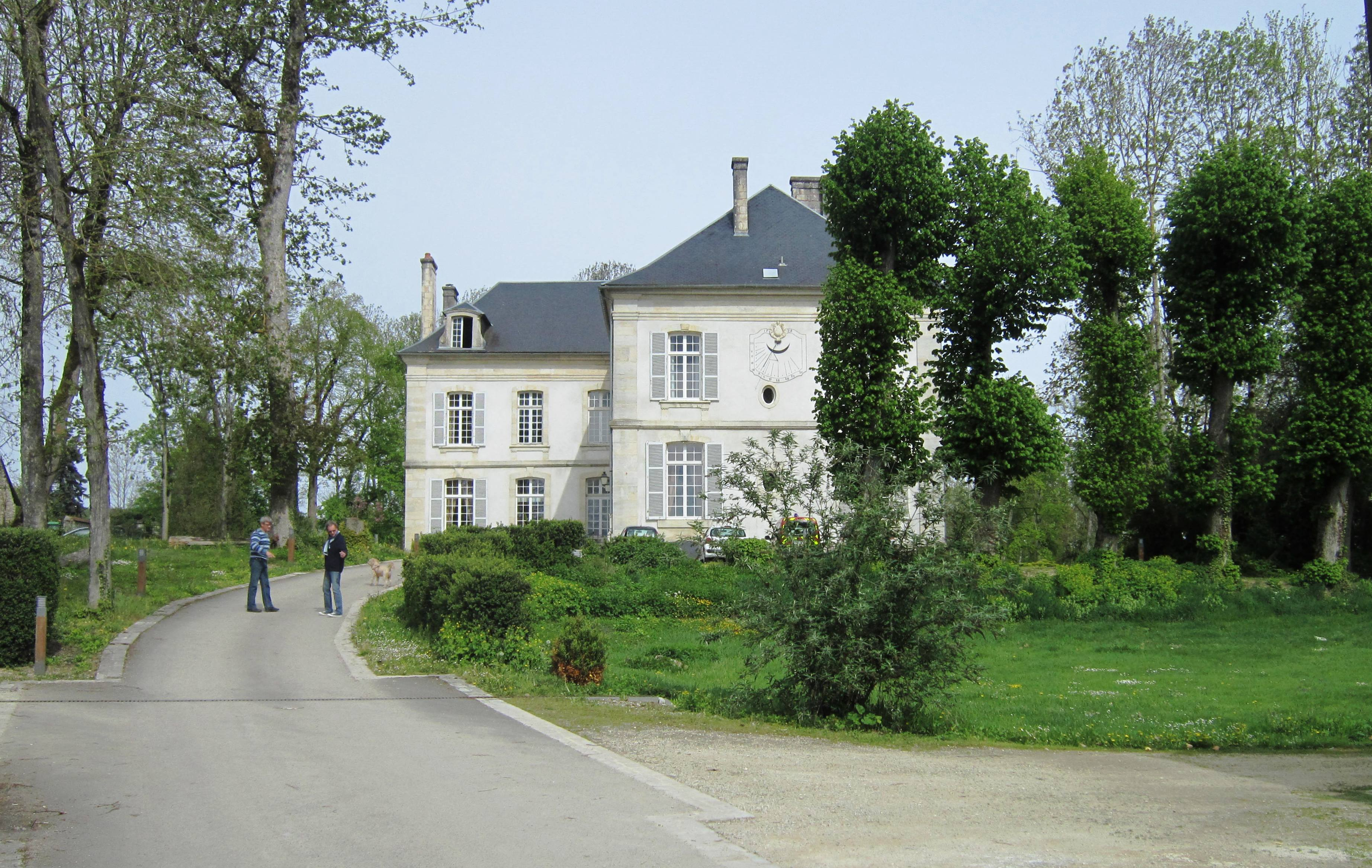 Pothières (Côte-d'Or) : l'abbaye